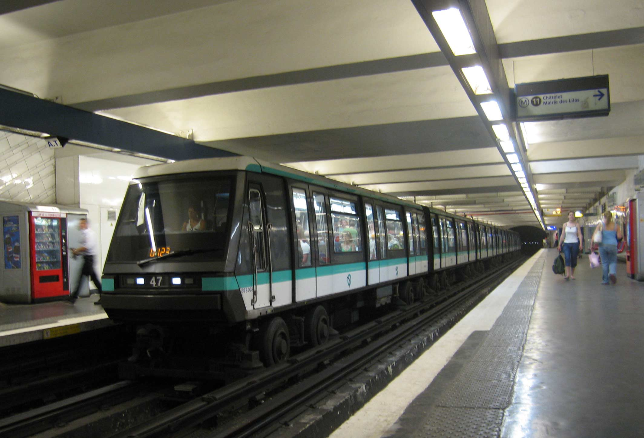 Metro de Paris Rame de la serie MP89 à la station Hotel de Ville sur la ligne 1 Lieu : Paris, France Date : Juin 2006 Auteur : Pline photo personnelle